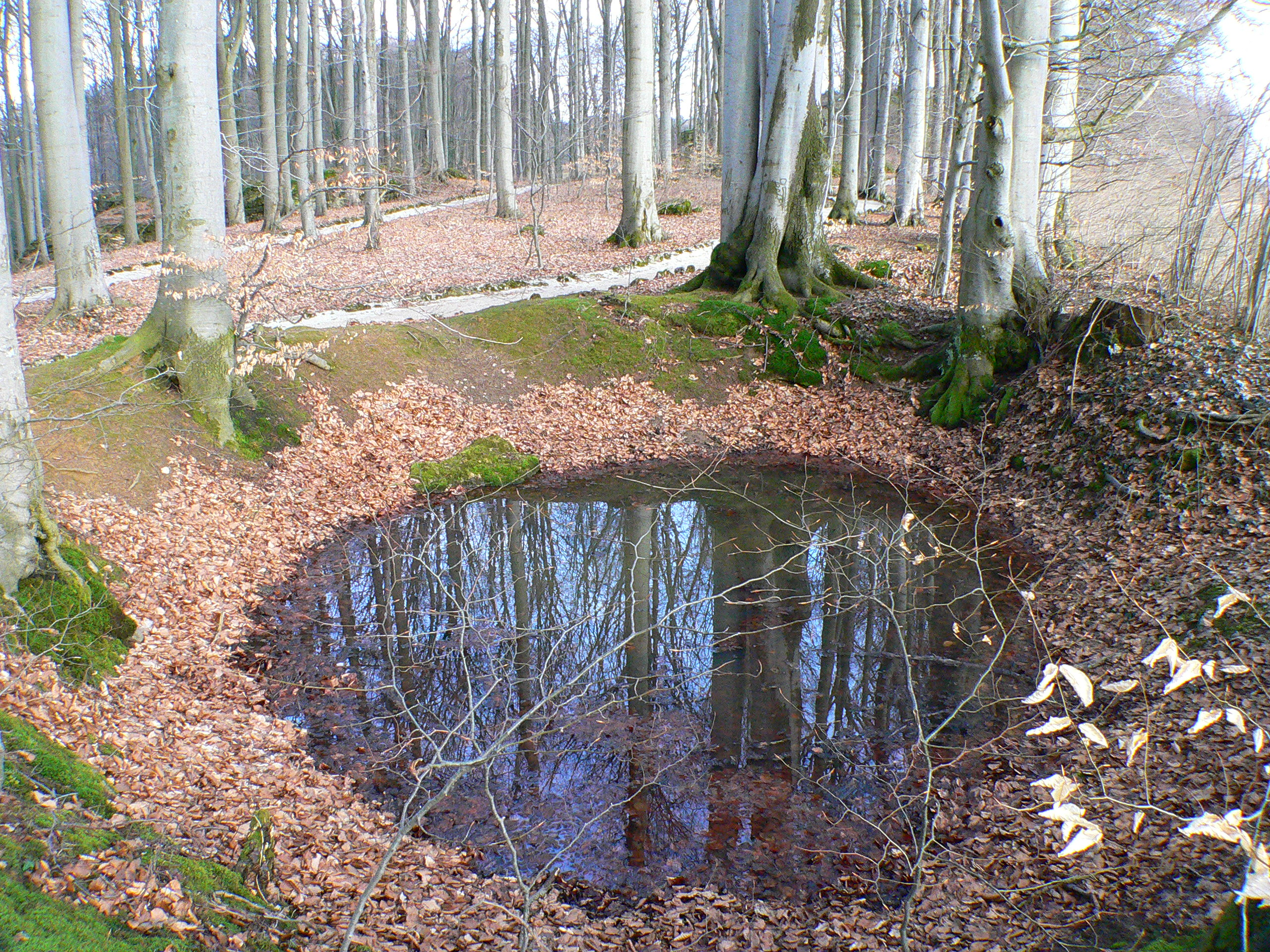 Felsengarten Sanspareil, Regenwasserloch - Fränkische Schweiz, Bayern